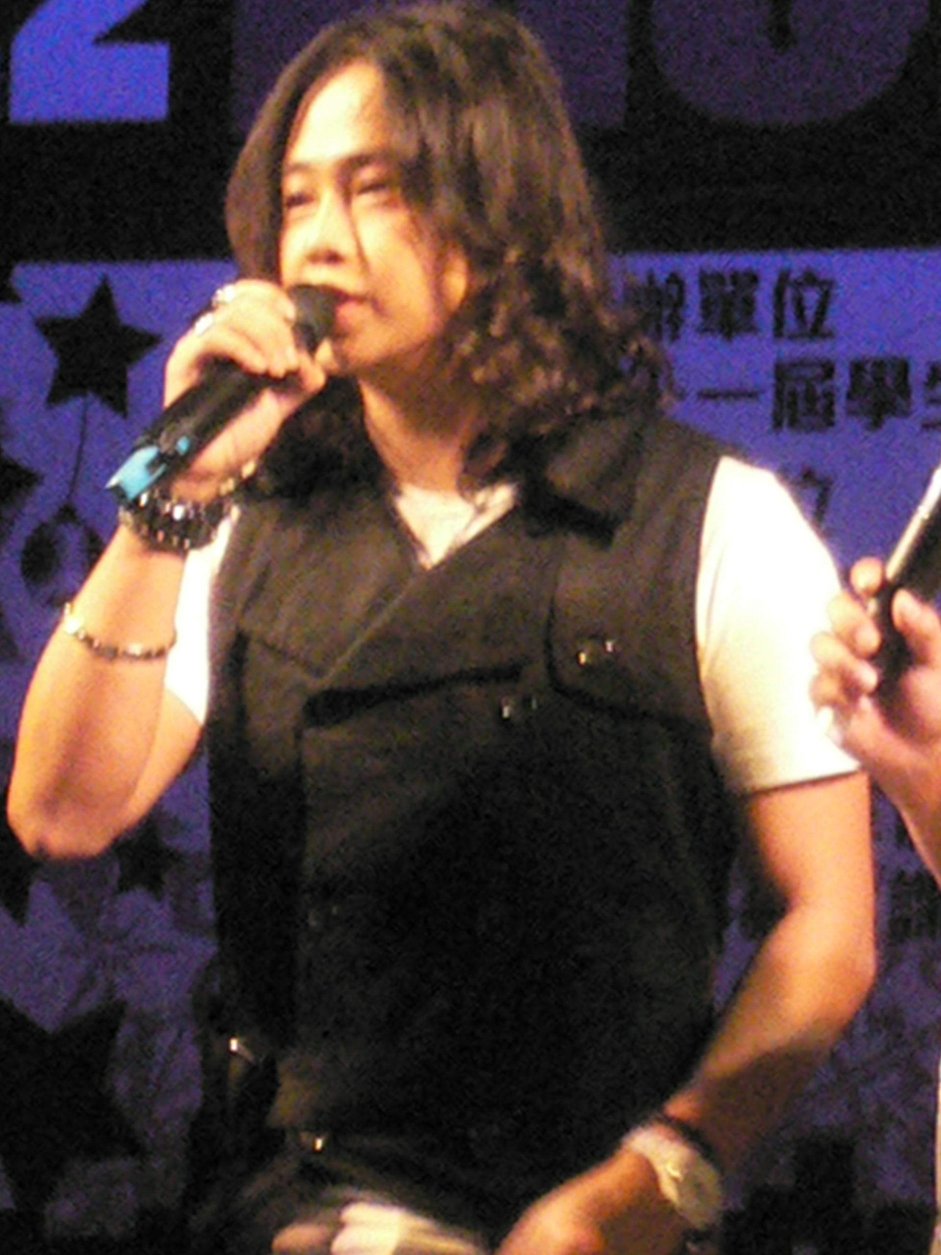 賴銘偉在南台科技大學的《Nice Team Night》校園演唱會Bân-lâm-gú: Luā Bîng-uí(賴銘偉) tsāi Lâm-tâi Kho-ki Tāi-ha̍k ê Nice Team Night hāu-hn̂g ián-tshiùnn-huē.